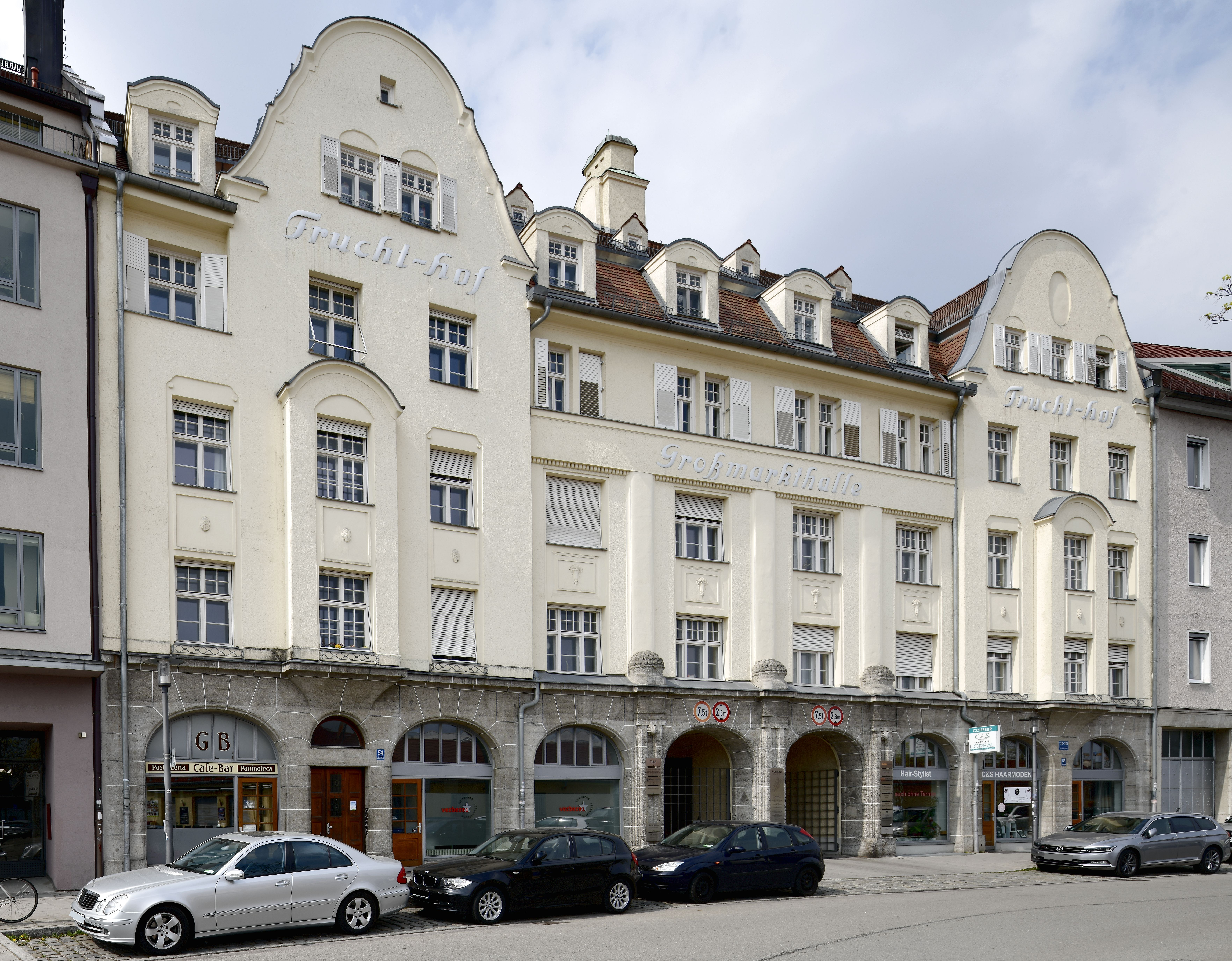 München, Sendling, Fassadenansicht Gotzinger Straße 52 und 54. Der Frucht-Hof. Zustand April 2019.